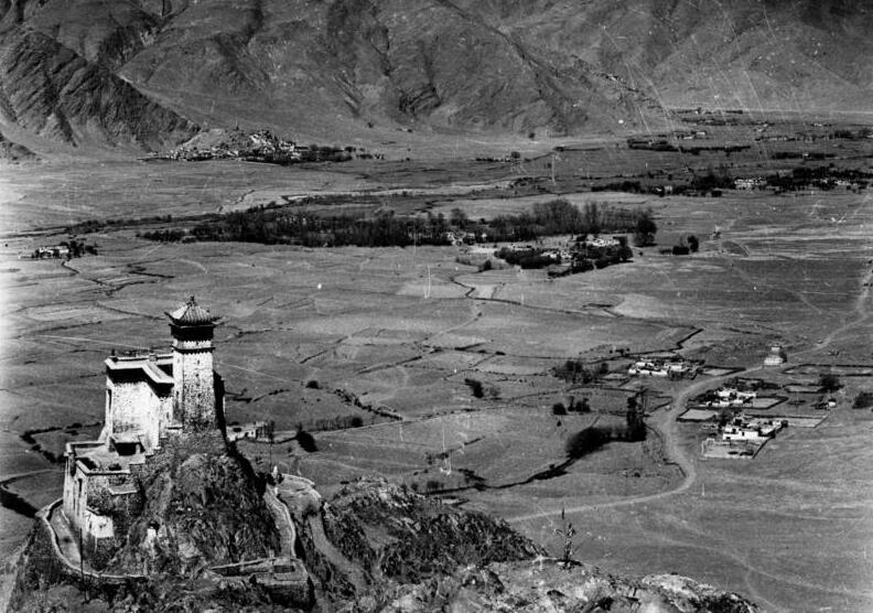 Hampulakang, Gesamtansicht der Ortschaft